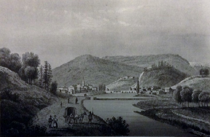 Châteaulin au milieu du XIXème siècle (par Bachelot de la Pylaie)